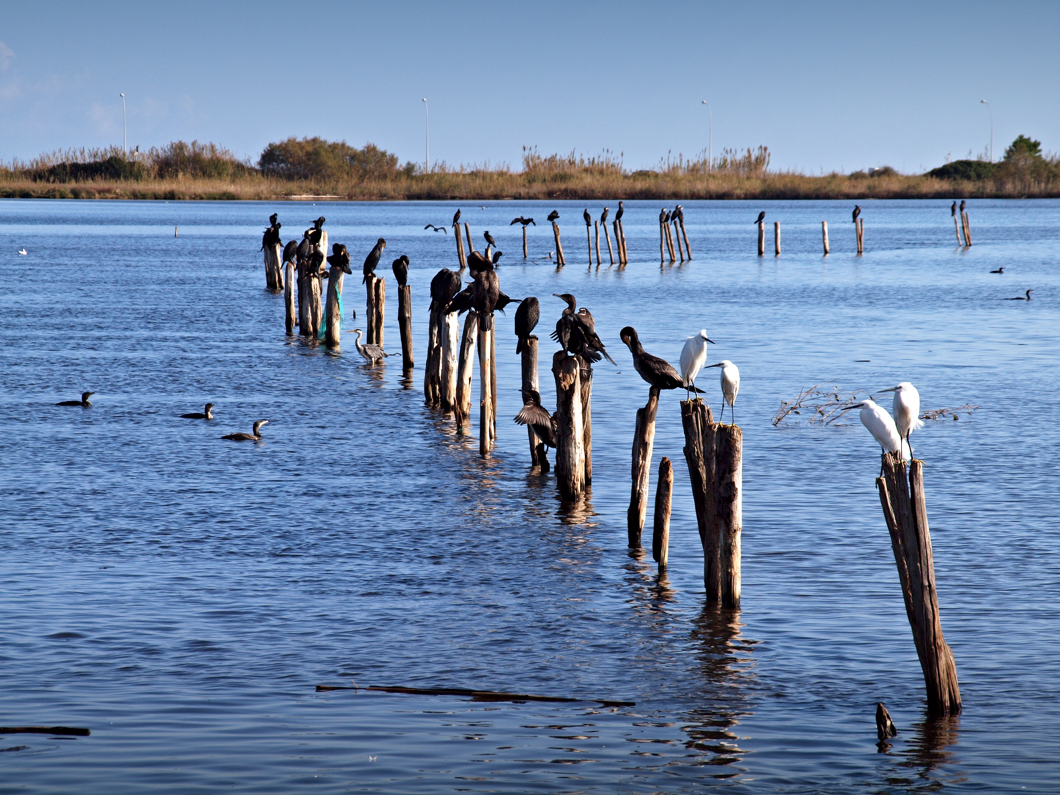 Furiani ((Corse) - Grands cormorans et aigrettes garzettes sur les pieux d'aulne glutineux de l'ancienne bordigue située à l'est du fortin de Biguglia